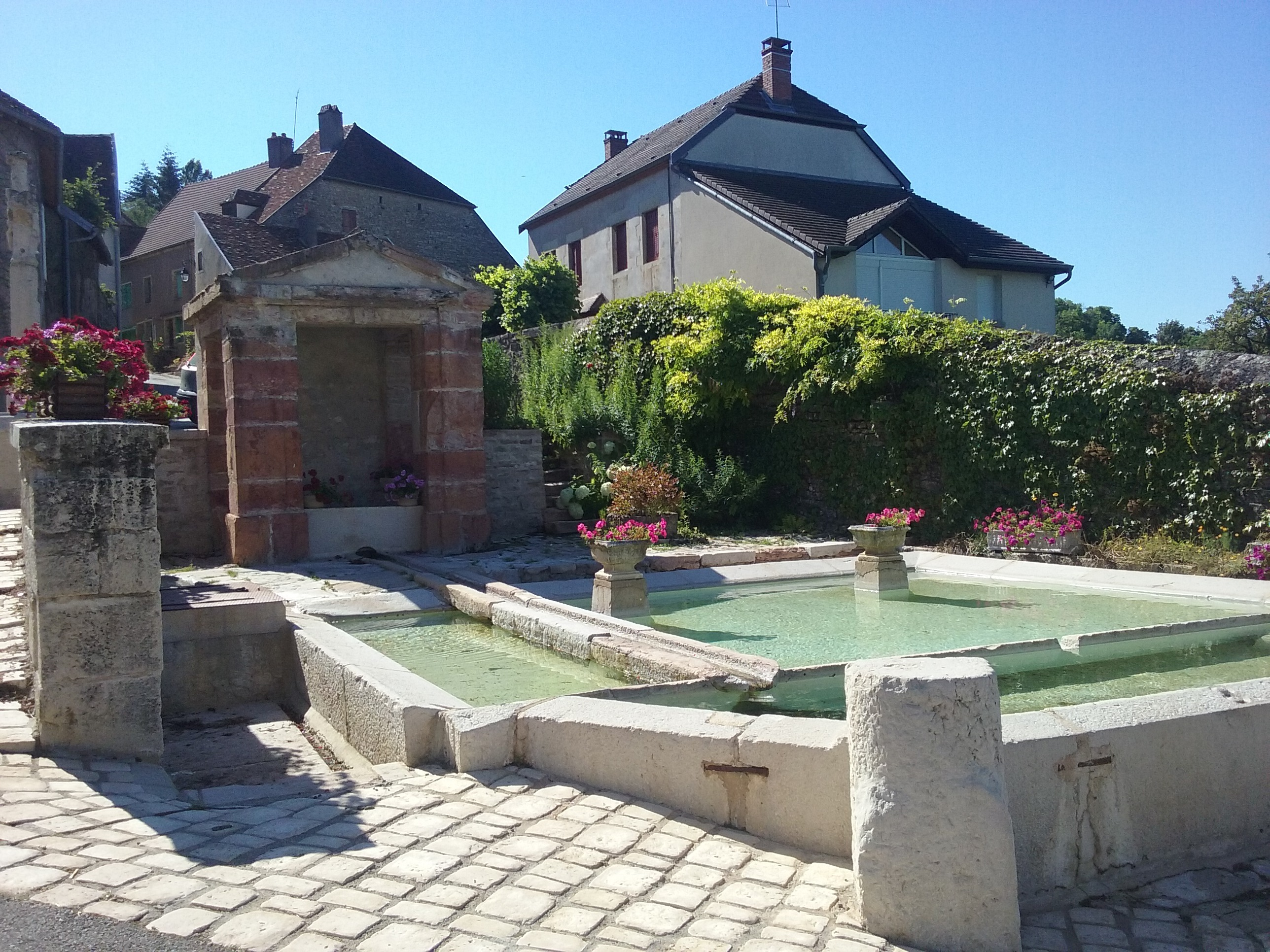 Menotey (Jura) - Ensemble formé par la fontaine, le lavoir et la croix (de profil à gauche de l'image). (Menotey, Jura)